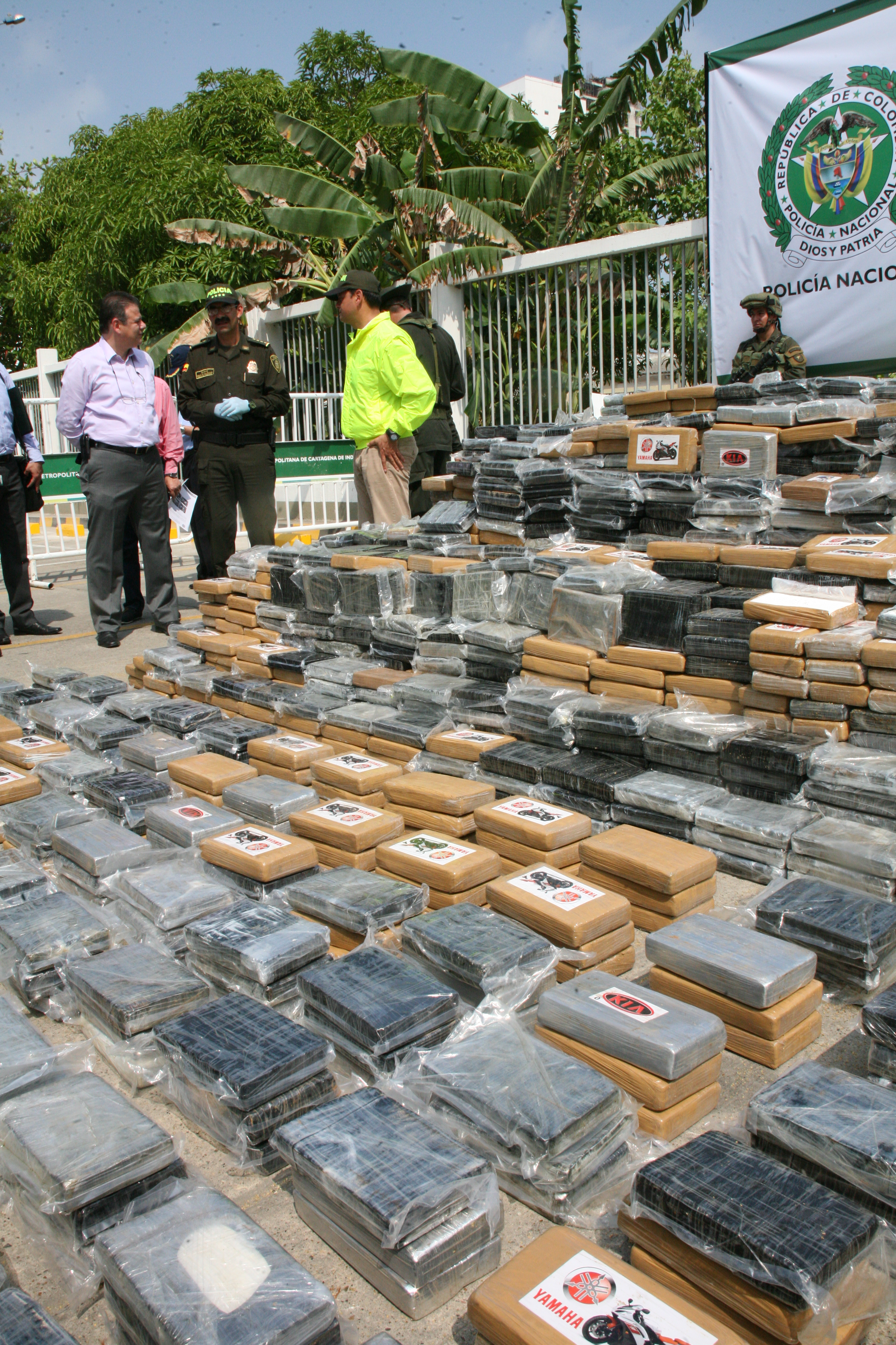 La Policía incautó siete toneladas de cocaína, que iban ha ser importadas por el puerto de Cartagena. La droga estaba camuflada en un contenedor donde presuntamente se enviaba trozos de piña procesada.